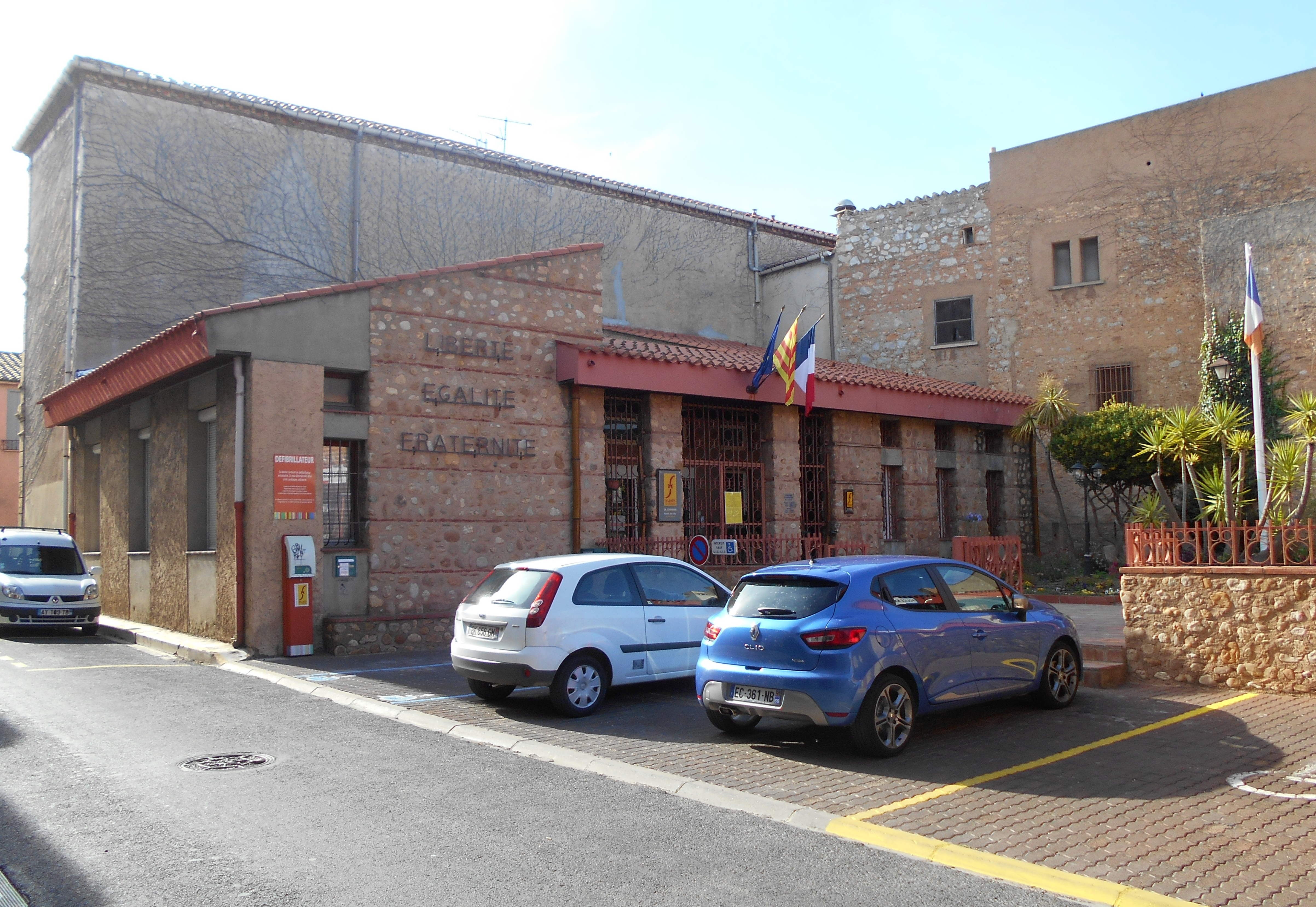 Casa de la Vila de Salses